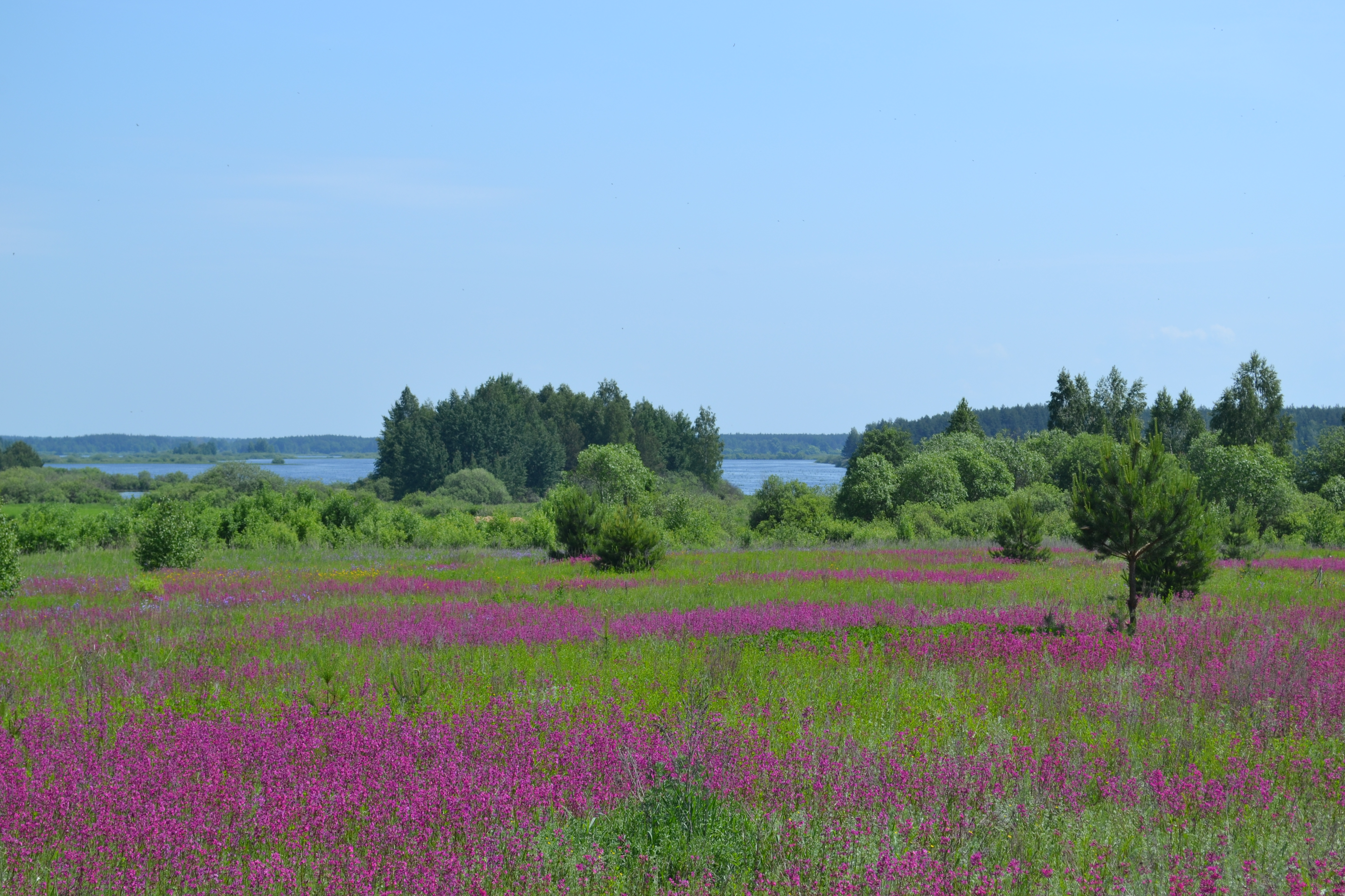 Поле между деревнями Филисово и Казыкино (Шатурский район)